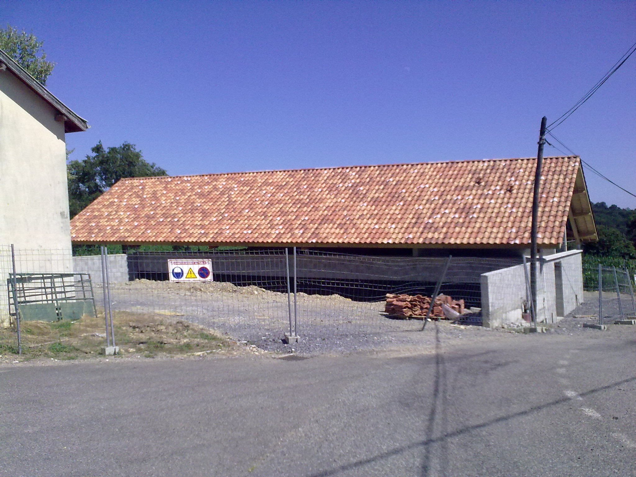 Labeyrie (Pyrénées-Atlantiques) le 18 juillet 2010, France.